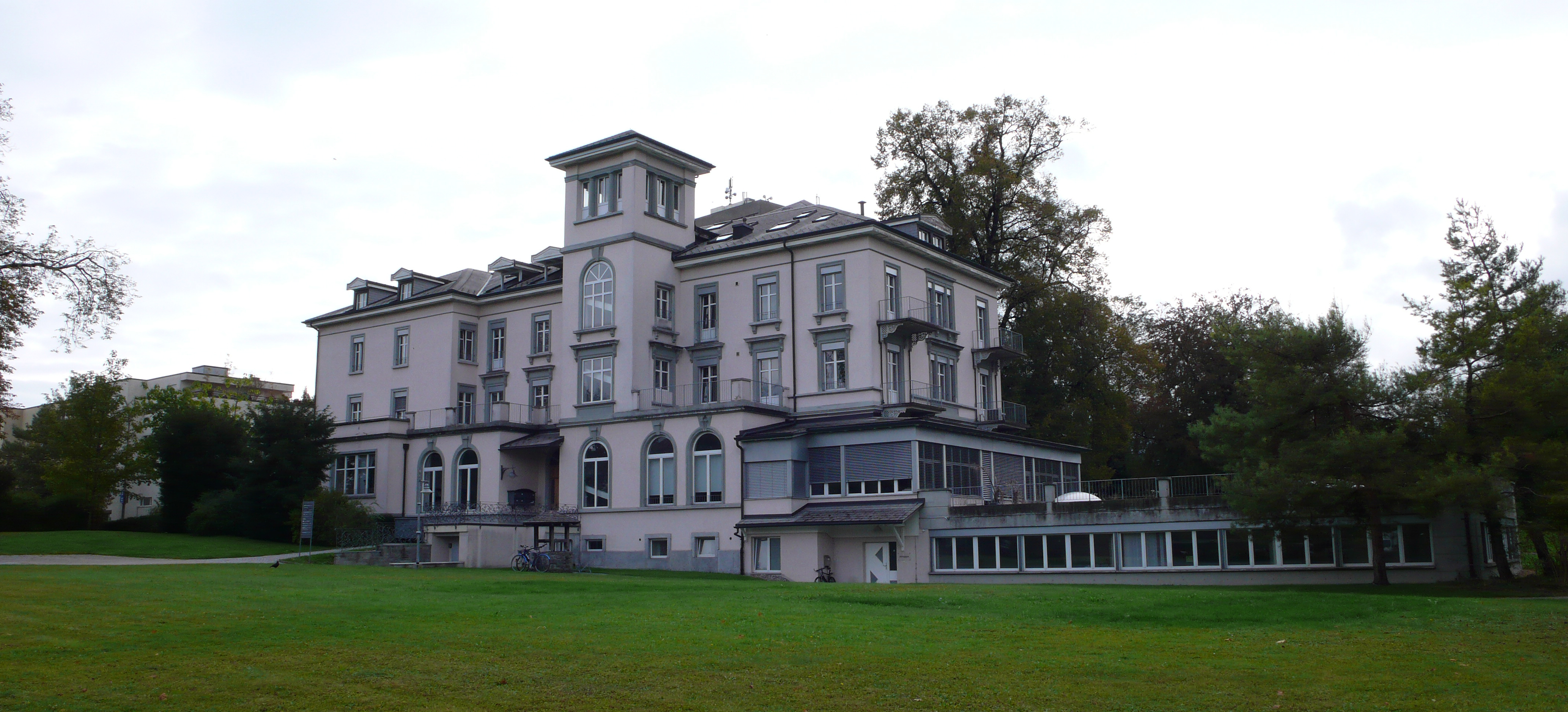 Ehemaliges Sanatorium Bellevue in Kreuzlingen